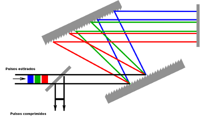 Diseño esquemático de un compresor basado en redes de difracción con dispersión negativa, esto es, las longitudes de onda cortas (azules) salen antes.